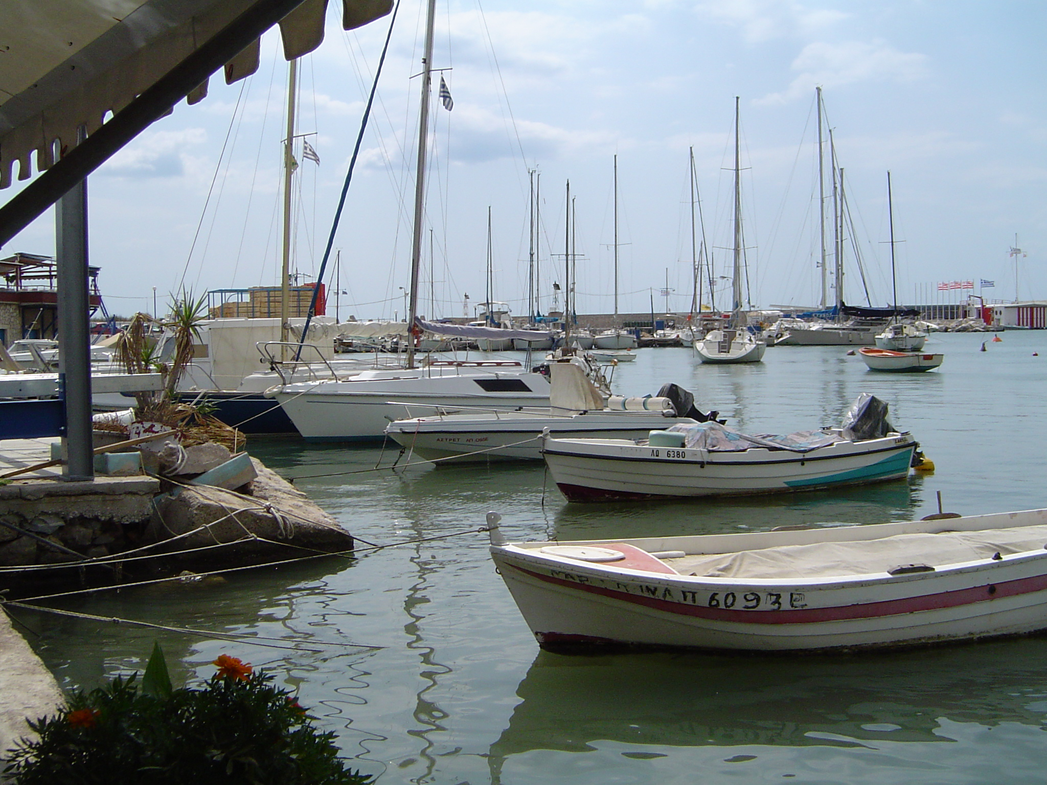 Sujet: Hafen vu Piräus 2004